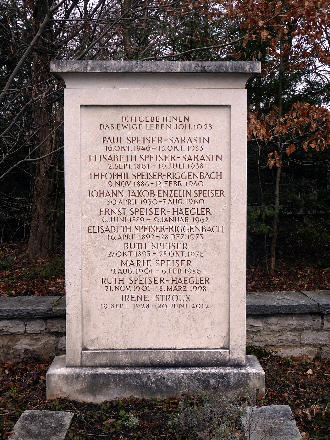 Paul Speiser-Sarasin (1846–1935) Dr.jur., Notar, Advokat, Prof. für Handels- und Steuerrecht, Dozent an der Univ. Basel, Dr. phil. h.c. der Univ. Basel, Politiker, Autor. Grab auf dem Friedhof Hörnli, Riehen, Basel-Stadt